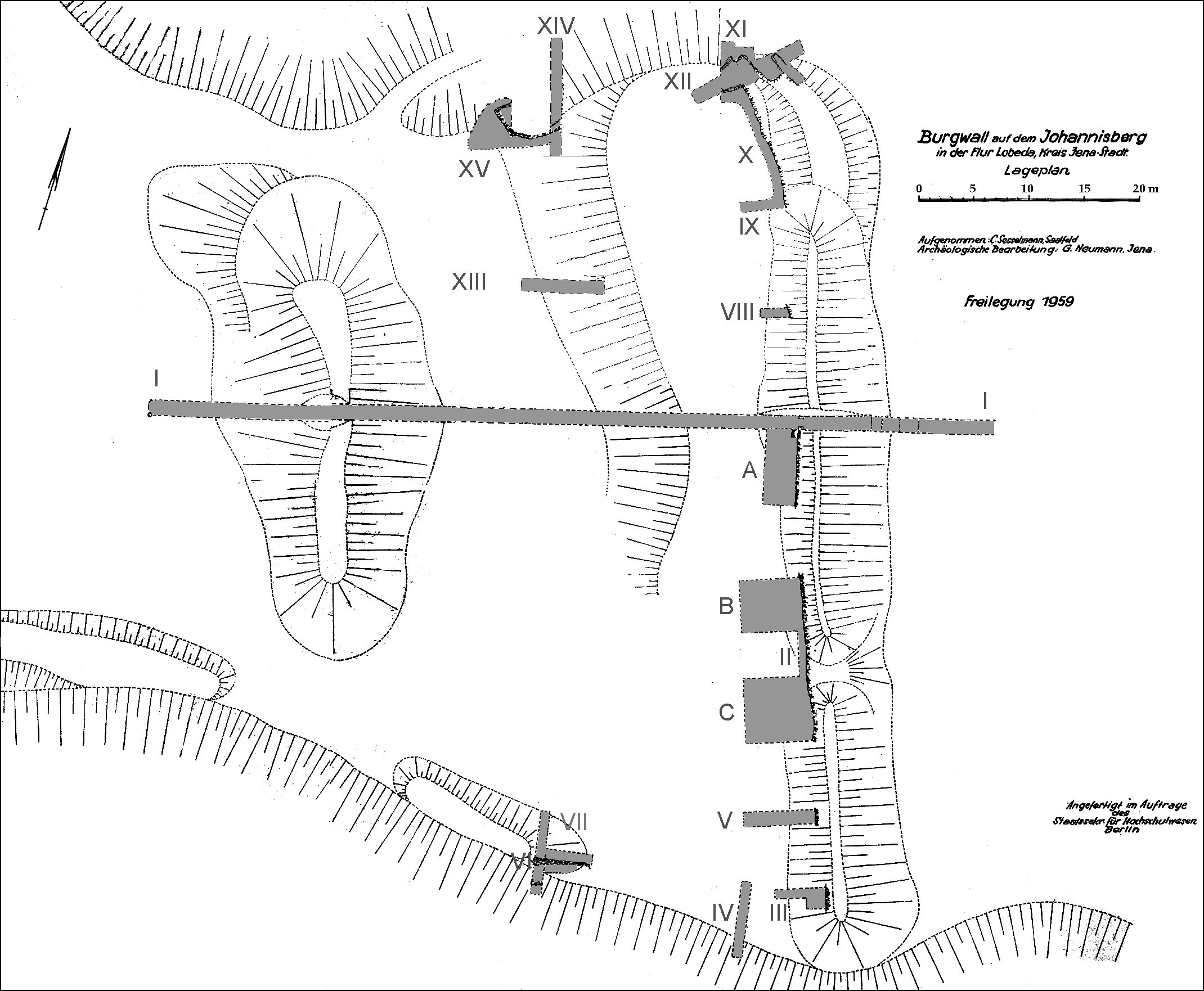 Jena-Lobeda, Johannisberg. Plan der Grabungsflächen 1957 und 1959 nach der Aufnahme durch Curt Sesselmann 1959, bearbeitet von Roman Grabolle 2006.